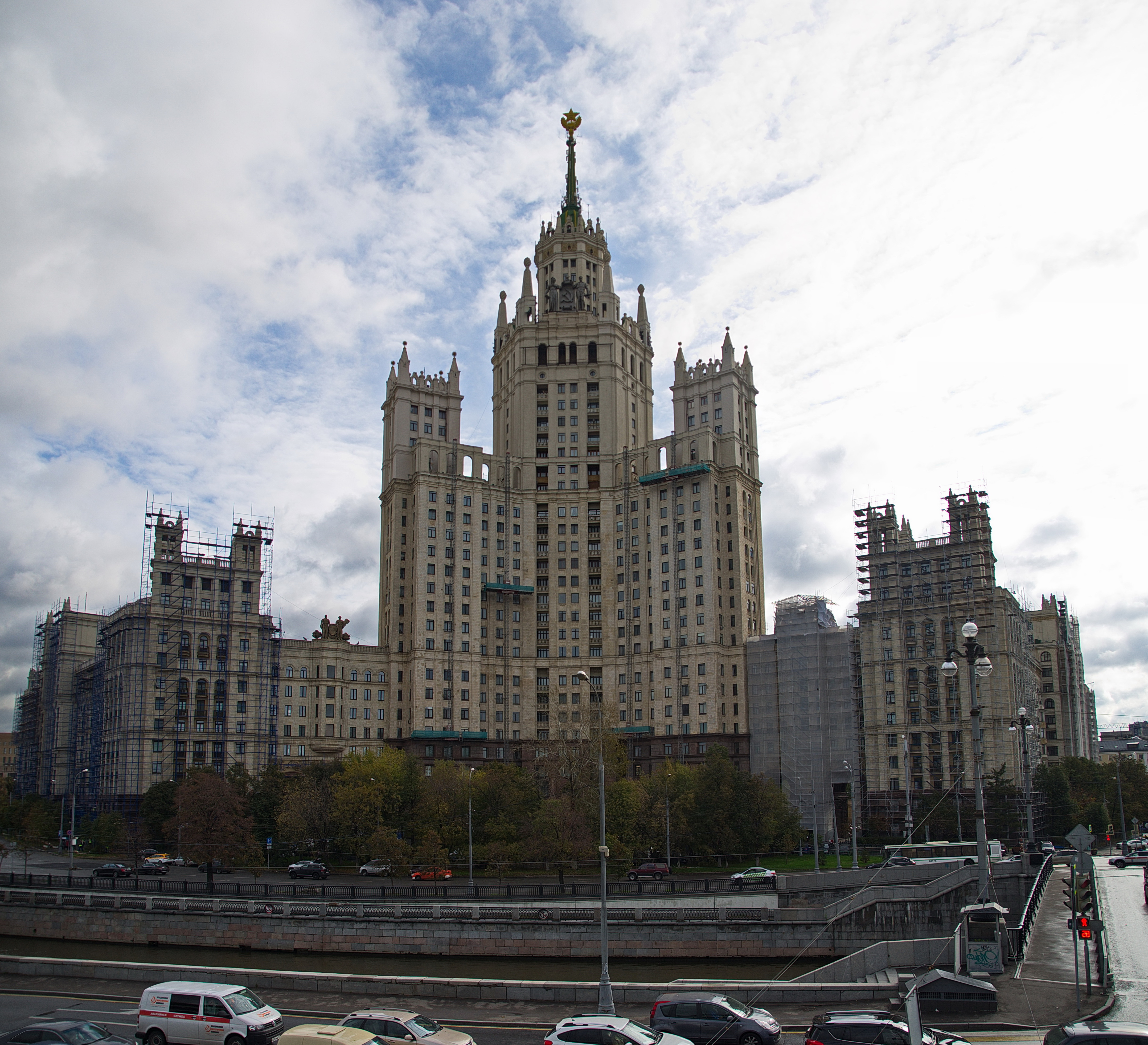 0928 - Moskau 2015